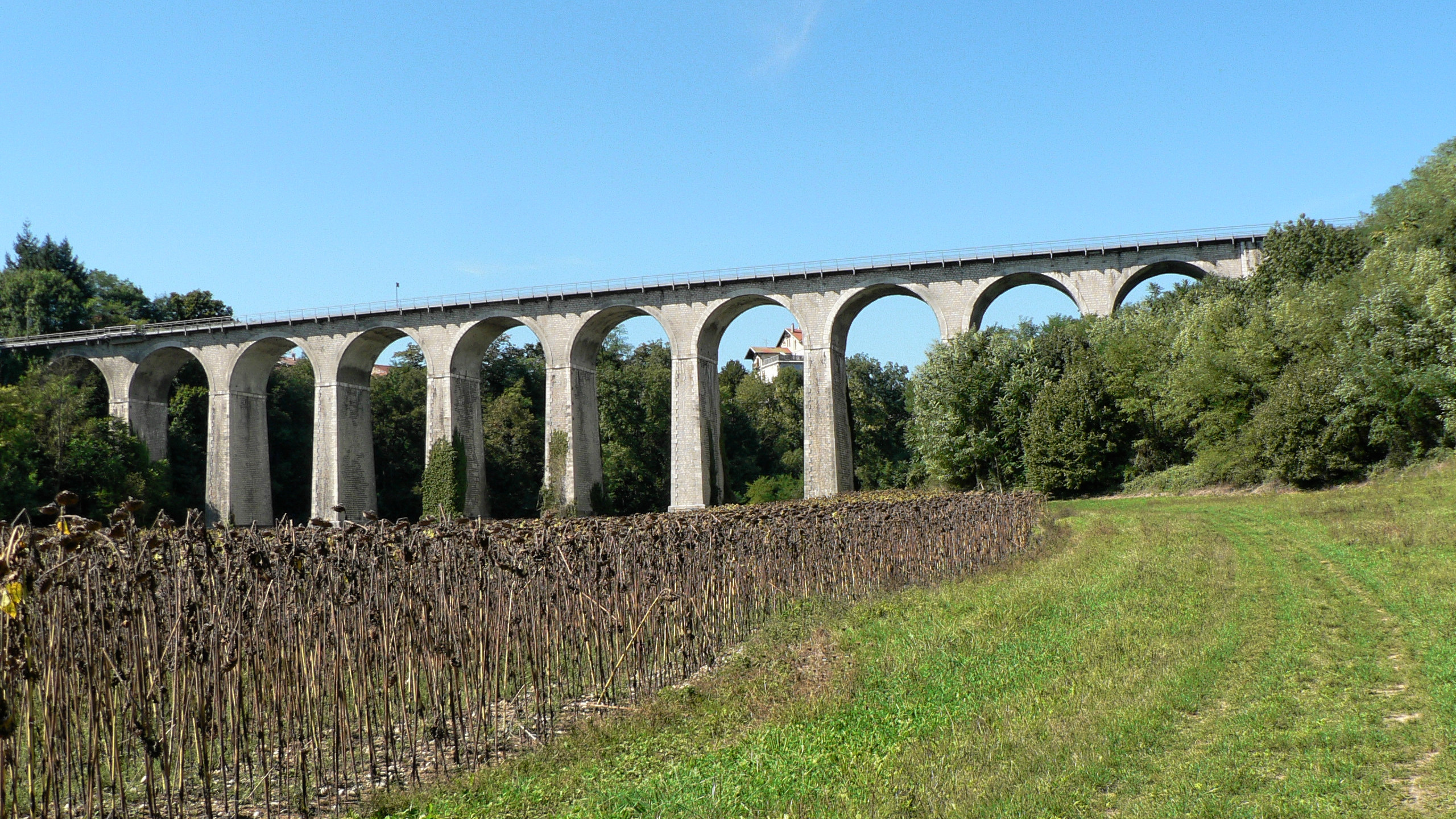 Le viaduc ferroviaire de Saint-Marcellin